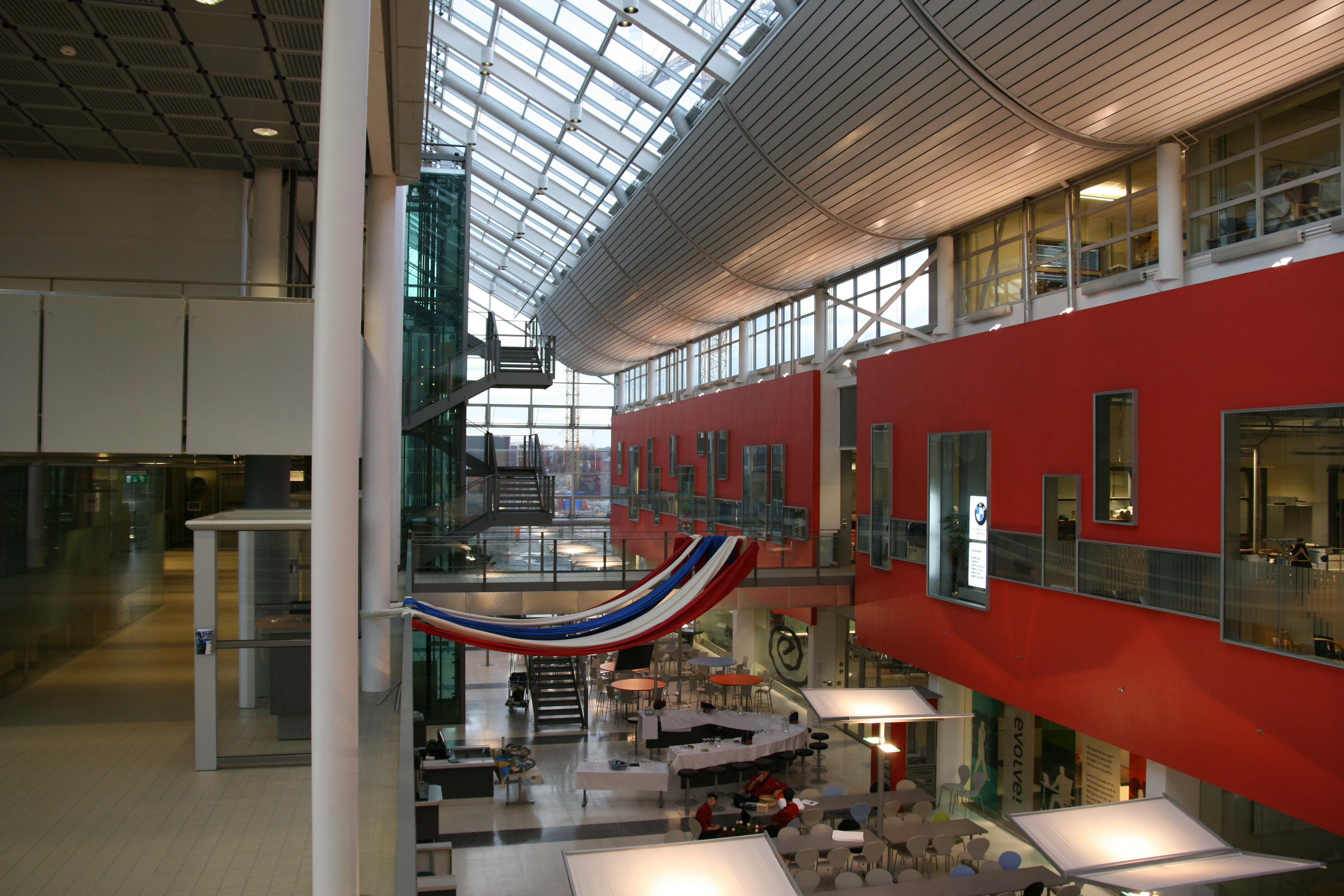 IT Fornebu, innvendig.